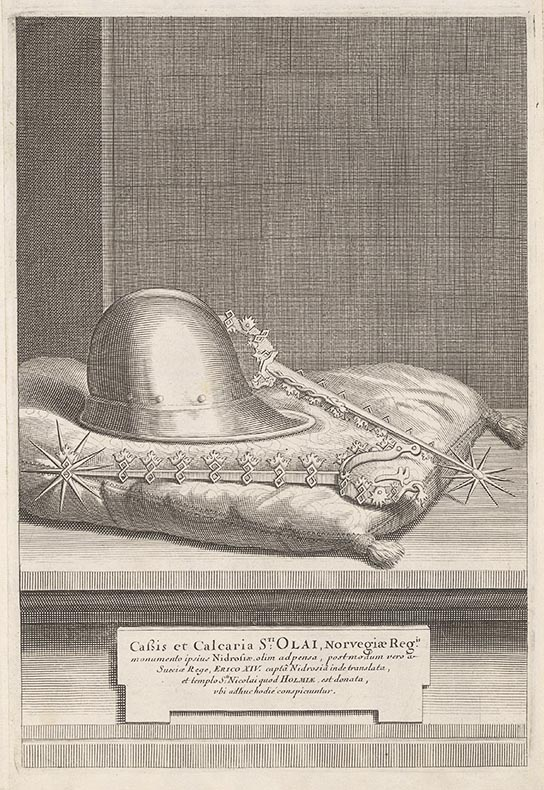 Titel i svensk övers. : Den norske konungen Olof den heliges hjälm och sporrar, minnesmärken som fordom funnos i Trondheim men som sedan av den svenska konungen Erik XIV vid Trondheims erövring fördes därifrån och överlämnades till Storkyrkan i Stockholm, där de ännu finnas att se Idag en del av samlingarna i Statens historiska museum